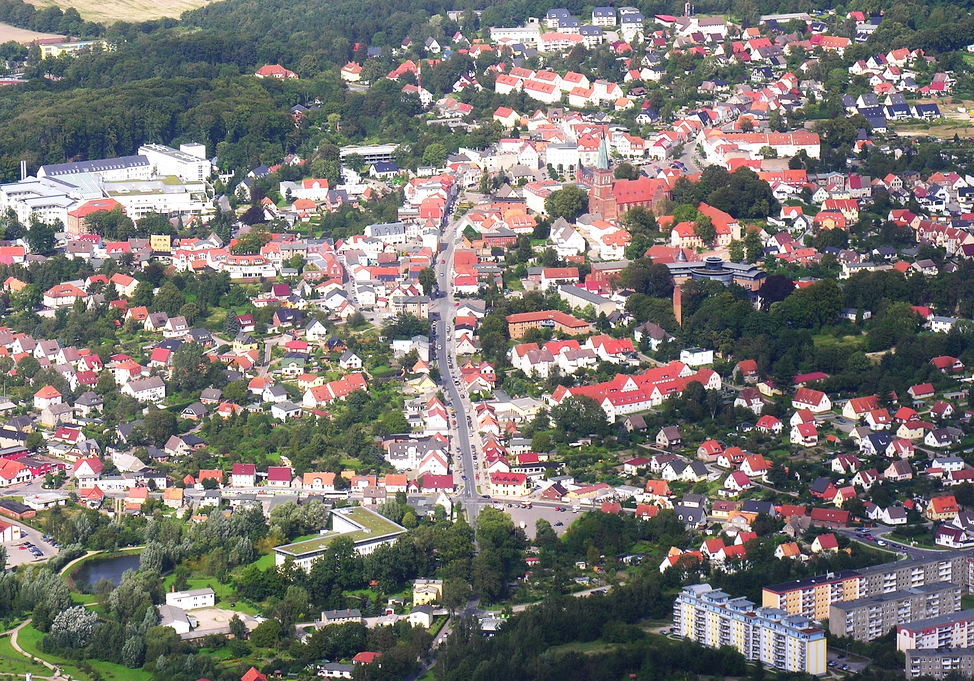 Luftbild Bergen auf Rügen mit dem Zentrum, der Dammstraße und Marktstraße sowie der Kirche St. Marien - Foto Wolfgang Pehlemann Steinberg Ostsee DSCN5769